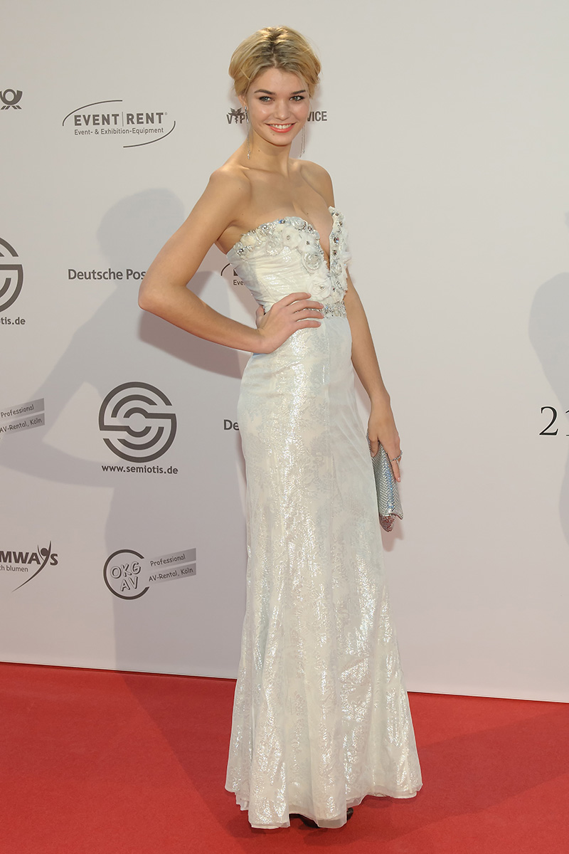 Luisa Hartema auf der UNESCO Gala 2012 in Düsseldorf